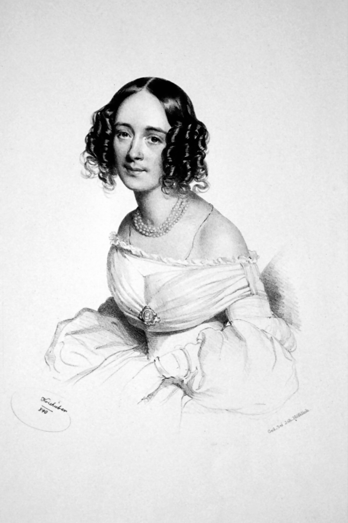 Laura Pawlikowska, geb. Gräfin Baroni-Cavalcado (1810-1892), Frau des Kunstsammlers Johann Gualbert Ritter von Pawlikowsky (1792-1852) . Lithographie von Josef Kriehuber, 1840